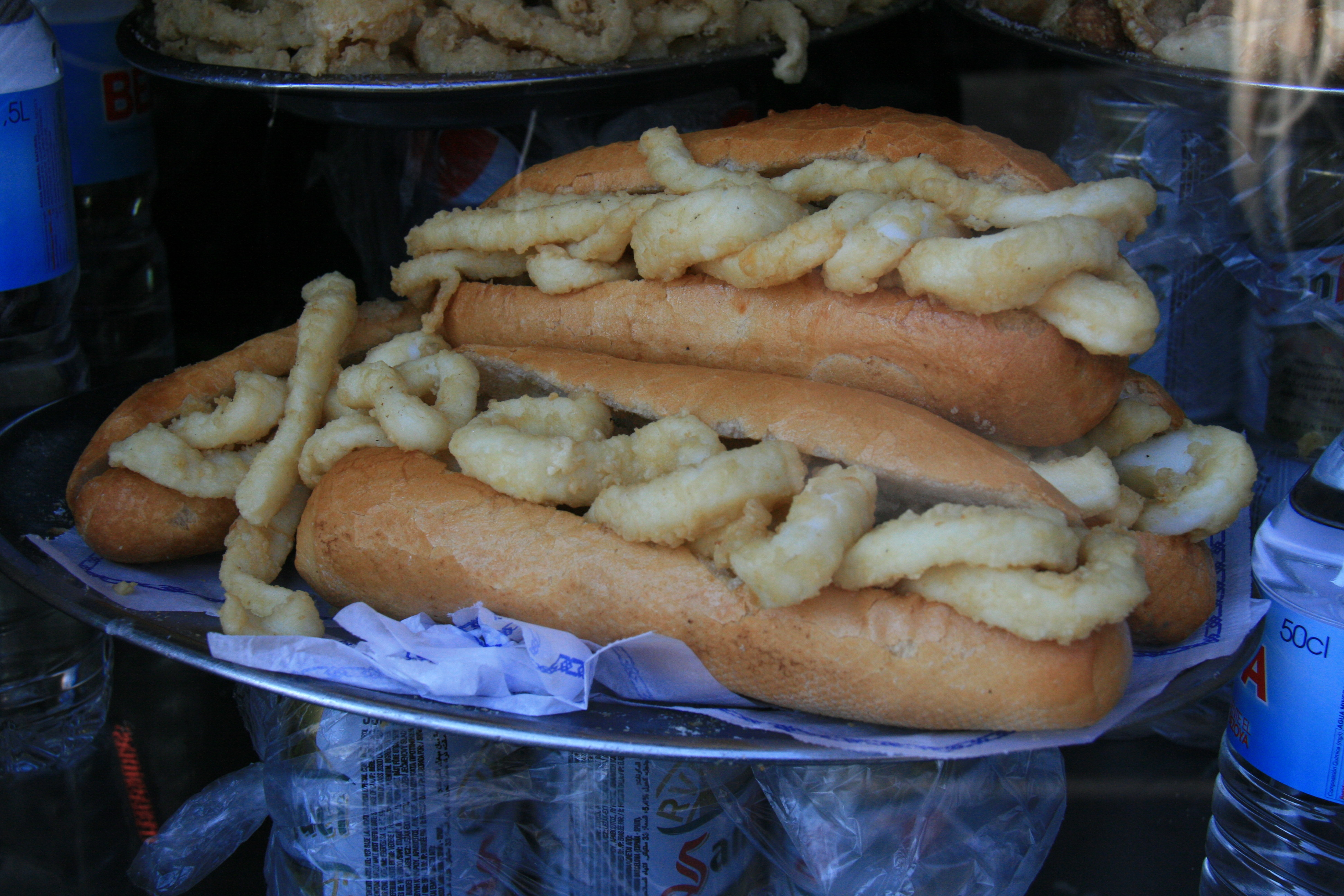 Bocadilo de Calamares - Atocha